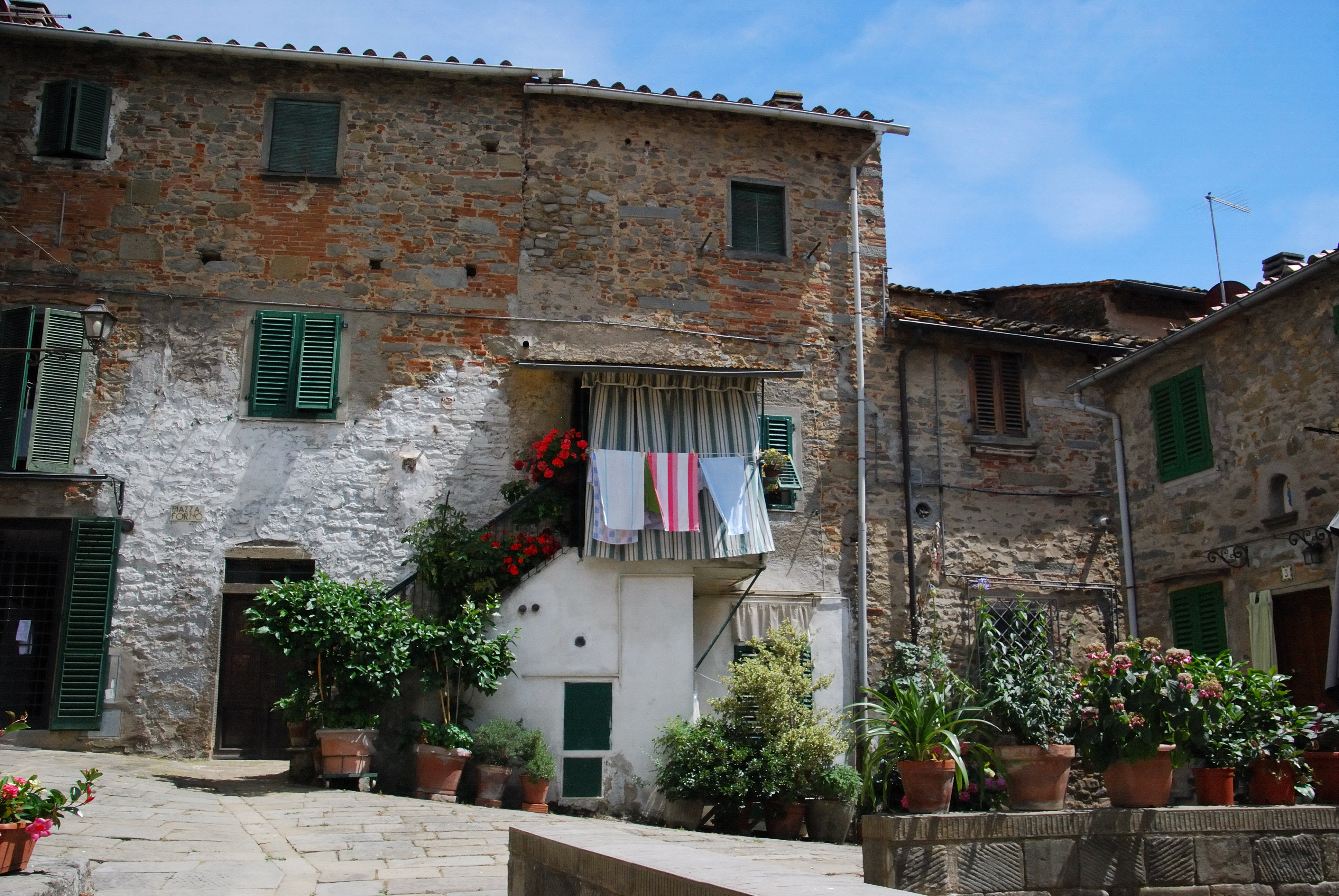 Loro Ciuffenna